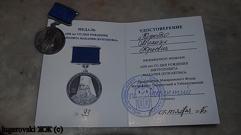 Медаль